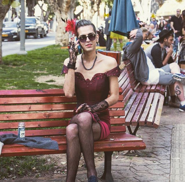 پیام فیلی